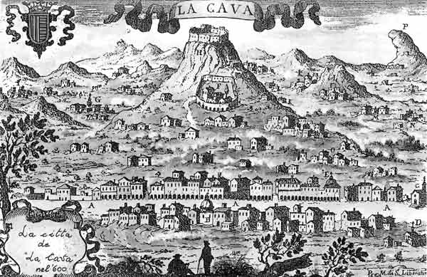 La città de "La Cava" nel '600